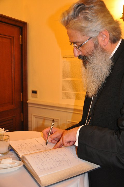 Μητροπολίτης Αλεξανδρουπόλεως Άνθιμος